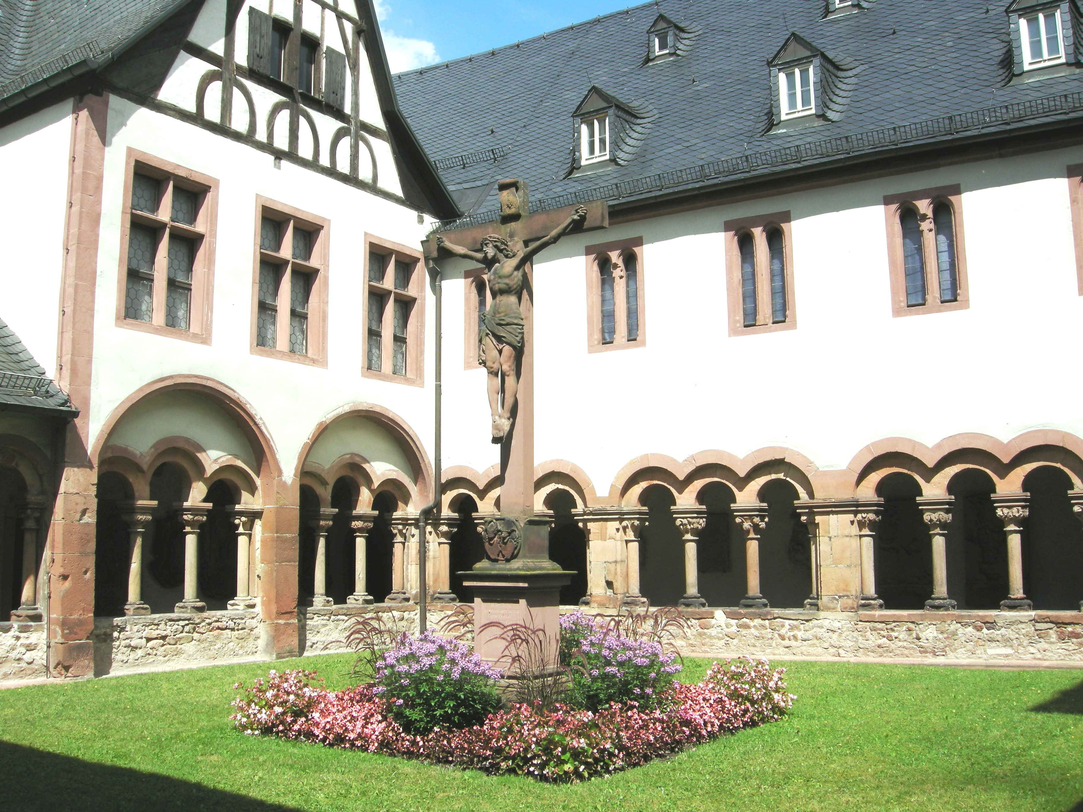 Kreuzgang an der Stiftskirche St. Peter und Alexander in Aschaffenburg